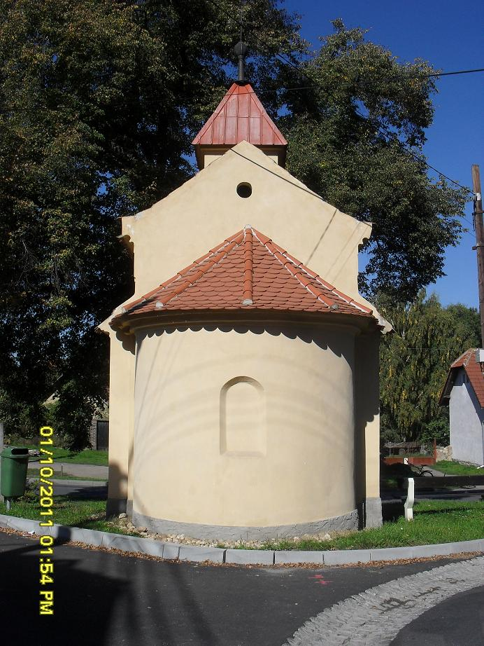 Kaplička svatého Gotharda ve Velkých Přílepech